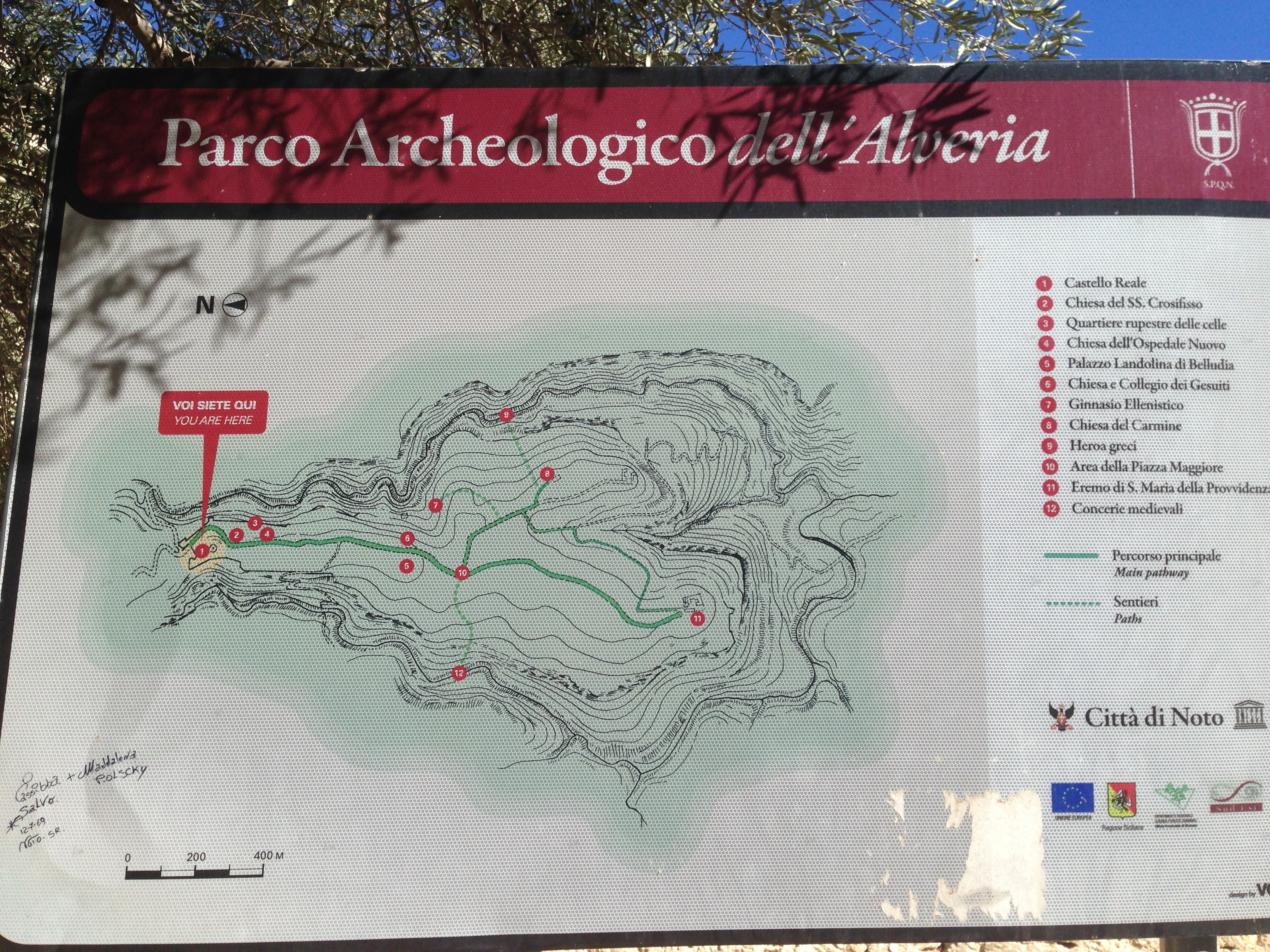 Mappa dell'area archeologica